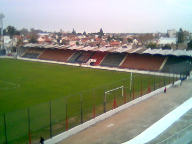 Vista de la platea de el Estadio Monumental de Victoria en Victoria, Buenos Aires, Argentina